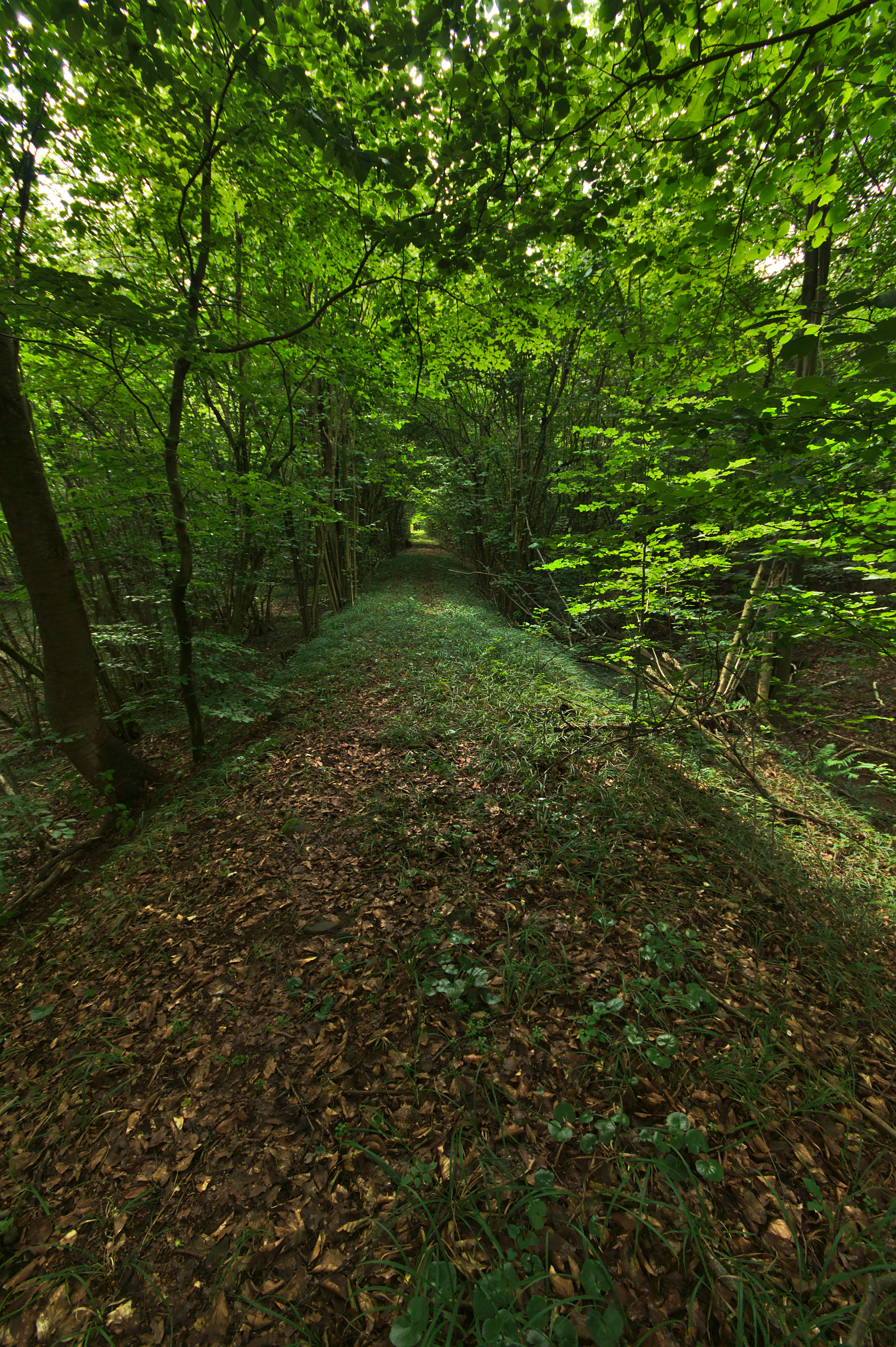 Stakčínska úzkokoľajka, pohorie Vihorlat